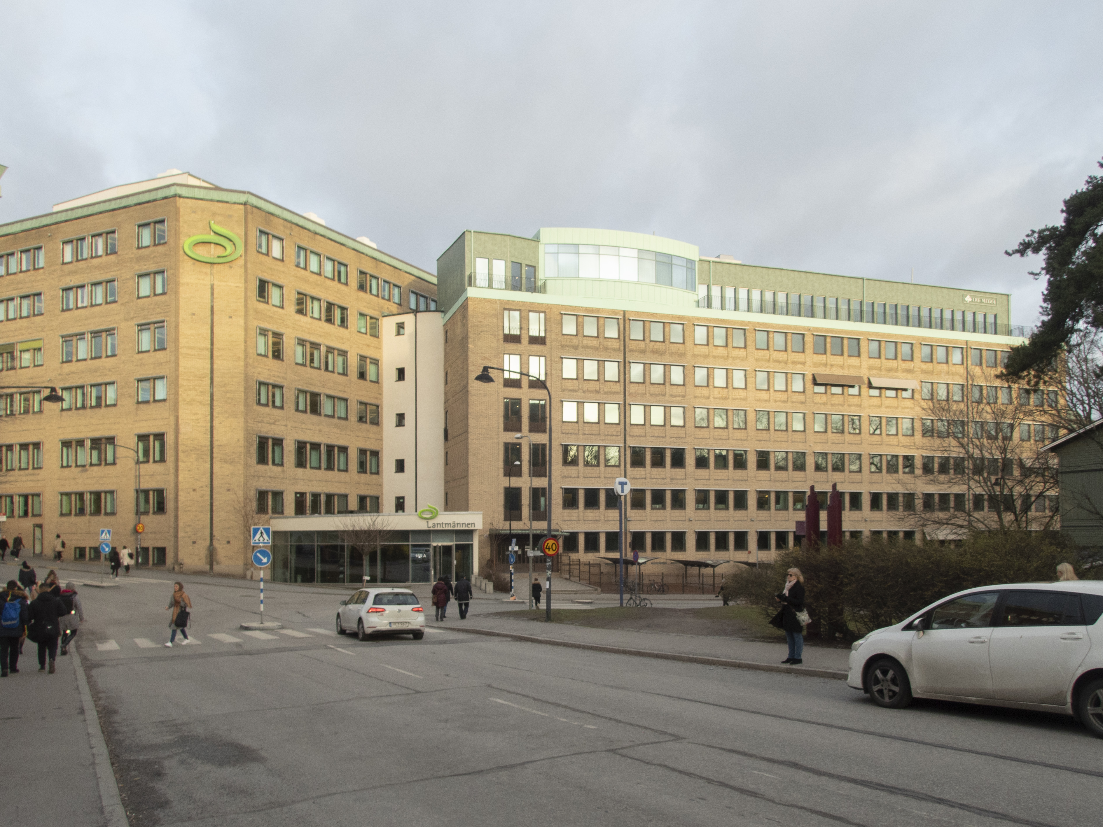 Fristaden 5, Sankt Göransgatan 160, Warfvinges väg 38 Stockholm. Nybyggnadsår 1949 - 1951 Bertil Bergman (Byggmästare) Karl G. H. Karlsson (Arkitekt) Landelius A. B. & Björklund (Byggherre) Nils Bonnier (Byggmästare)